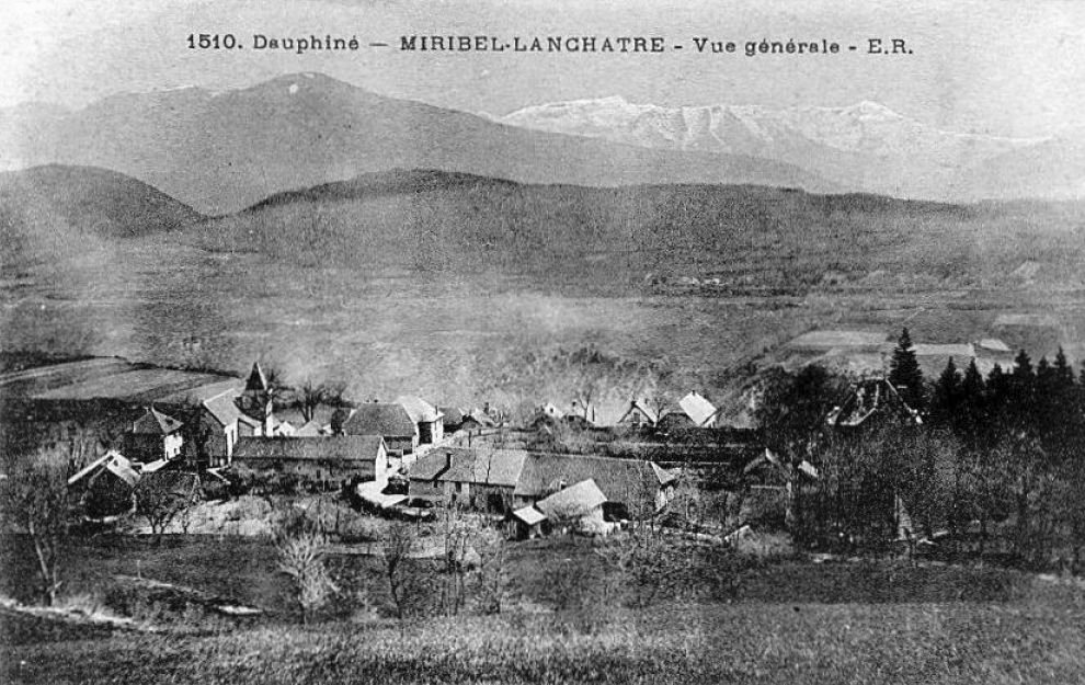 Carte postale ancienne, vue générale de Lanchâtre, Miribel-Lanchâtre, France.